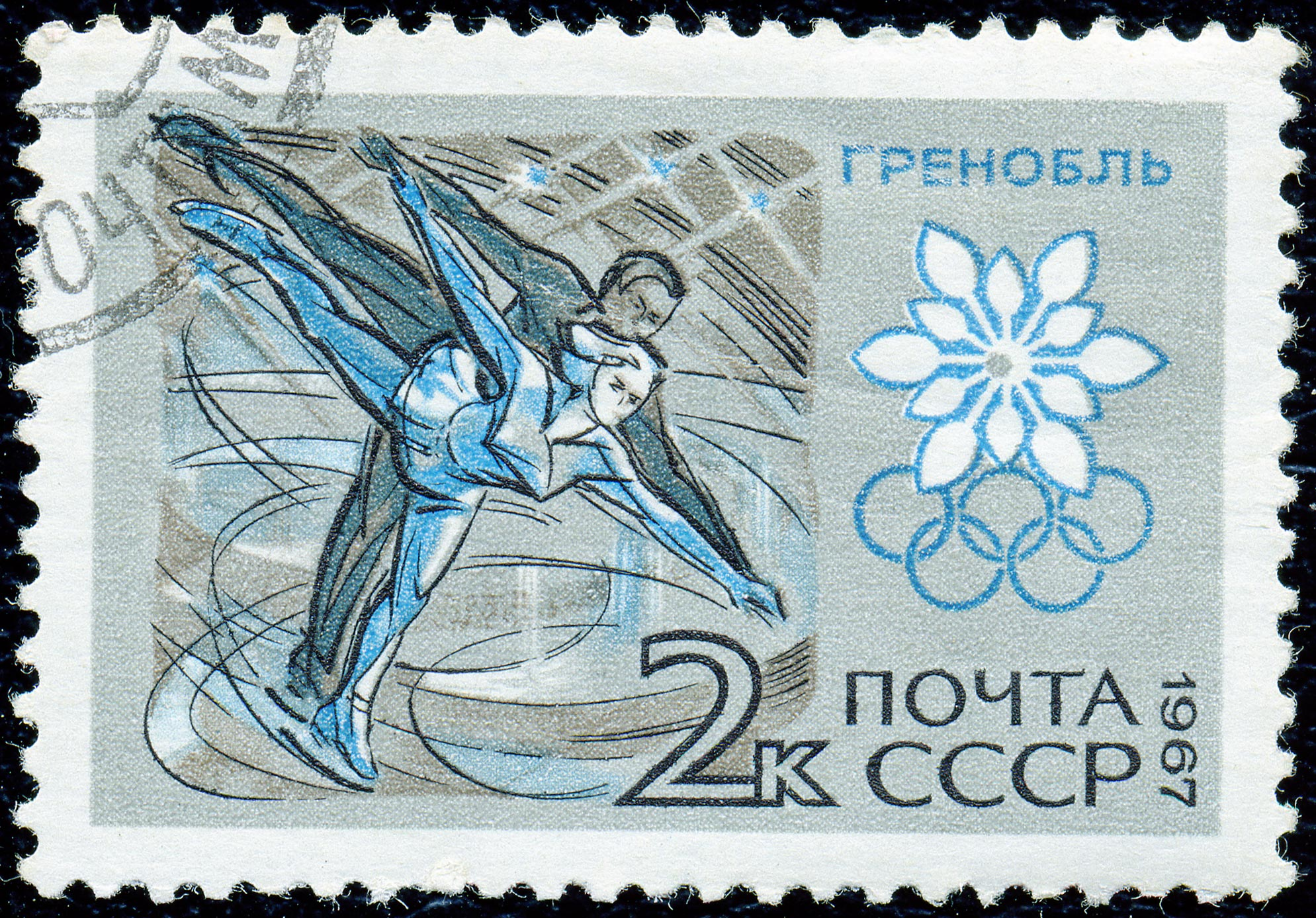 Почтовая марка СССР. 1967. X зимние Олимпийские игры. Фигурное катание